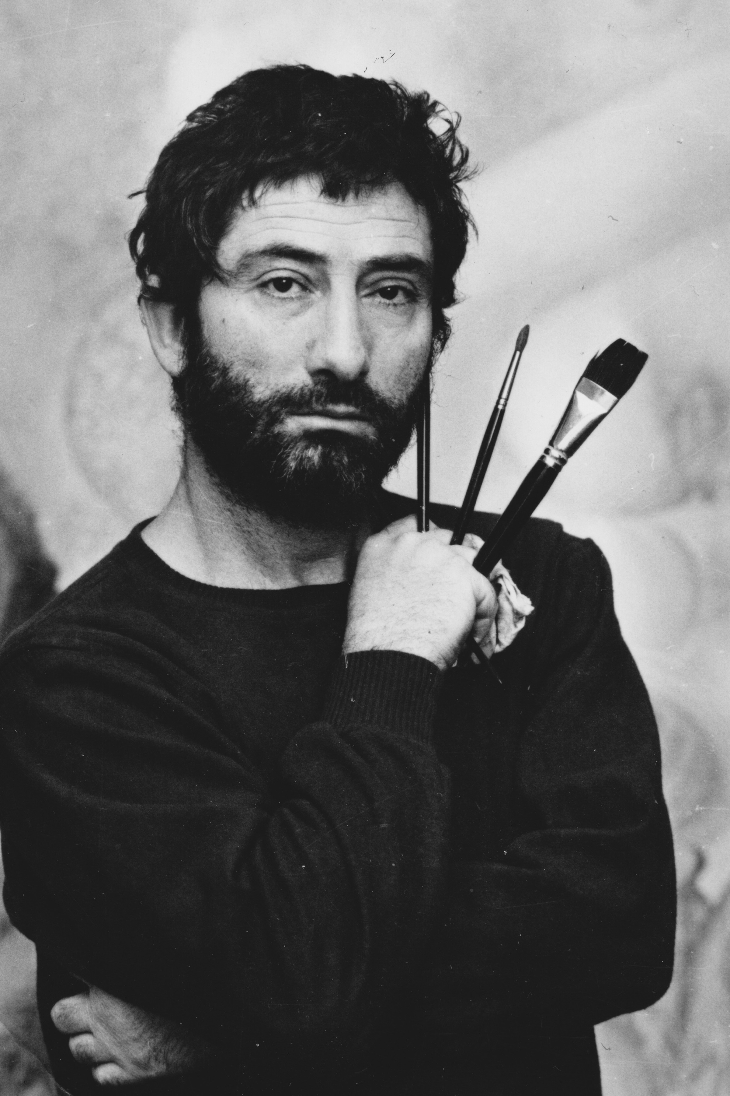 Ljuba photographié par son ami Vican Vicanovic